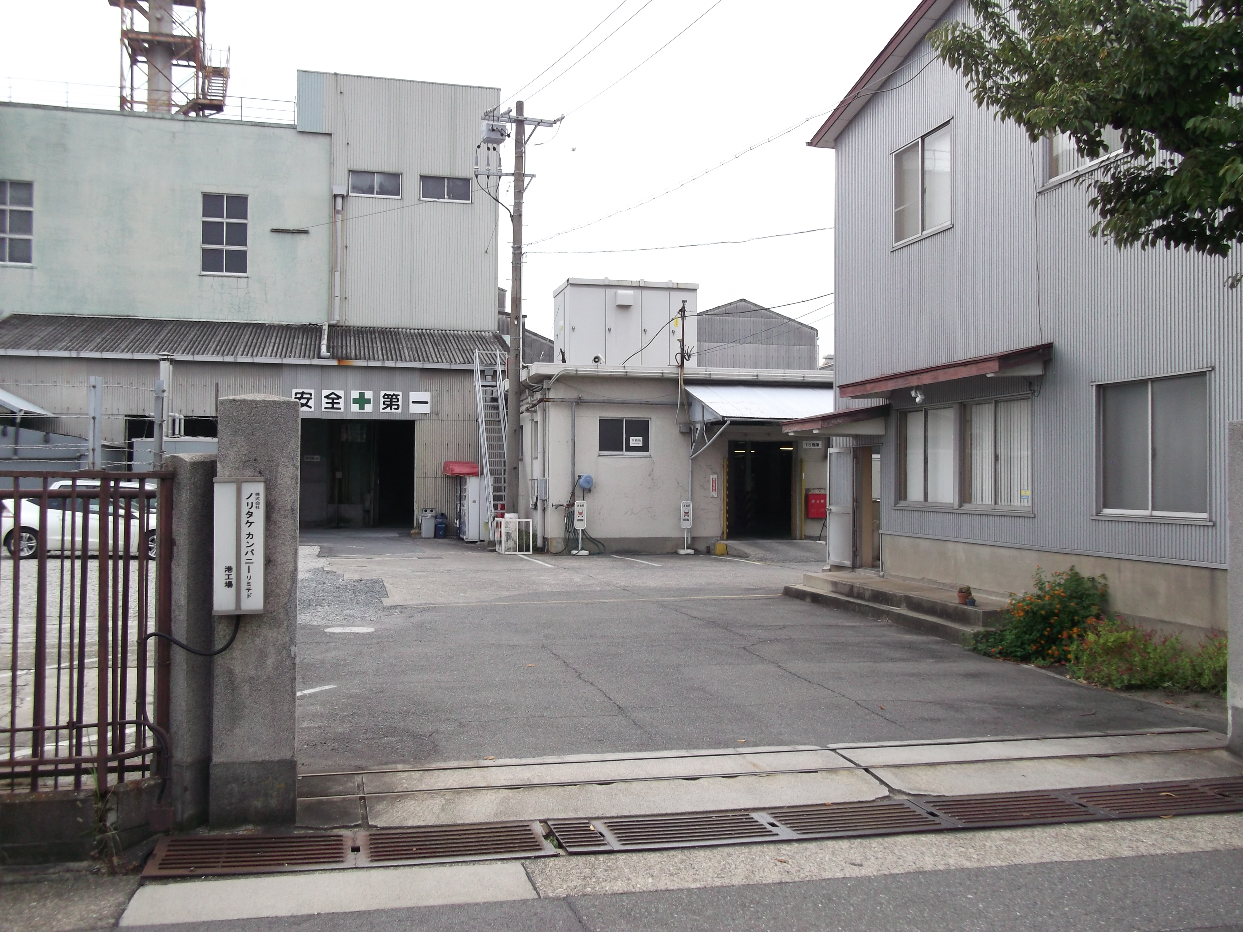 名古屋市港区築三町のノリタケカンパニーリミテド港工場を東側公道より撮影